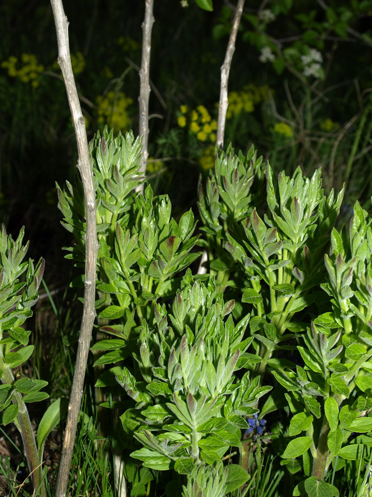 Nagyezerjófű fiatal hajtásai az egy évvel korábban elszáradt szárak között